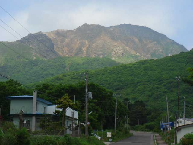 恵山南側斜面（旧恵山町側登山道へ至る道の上から写す）。2007年6月23日撮影。撮影者と投稿者は同一。